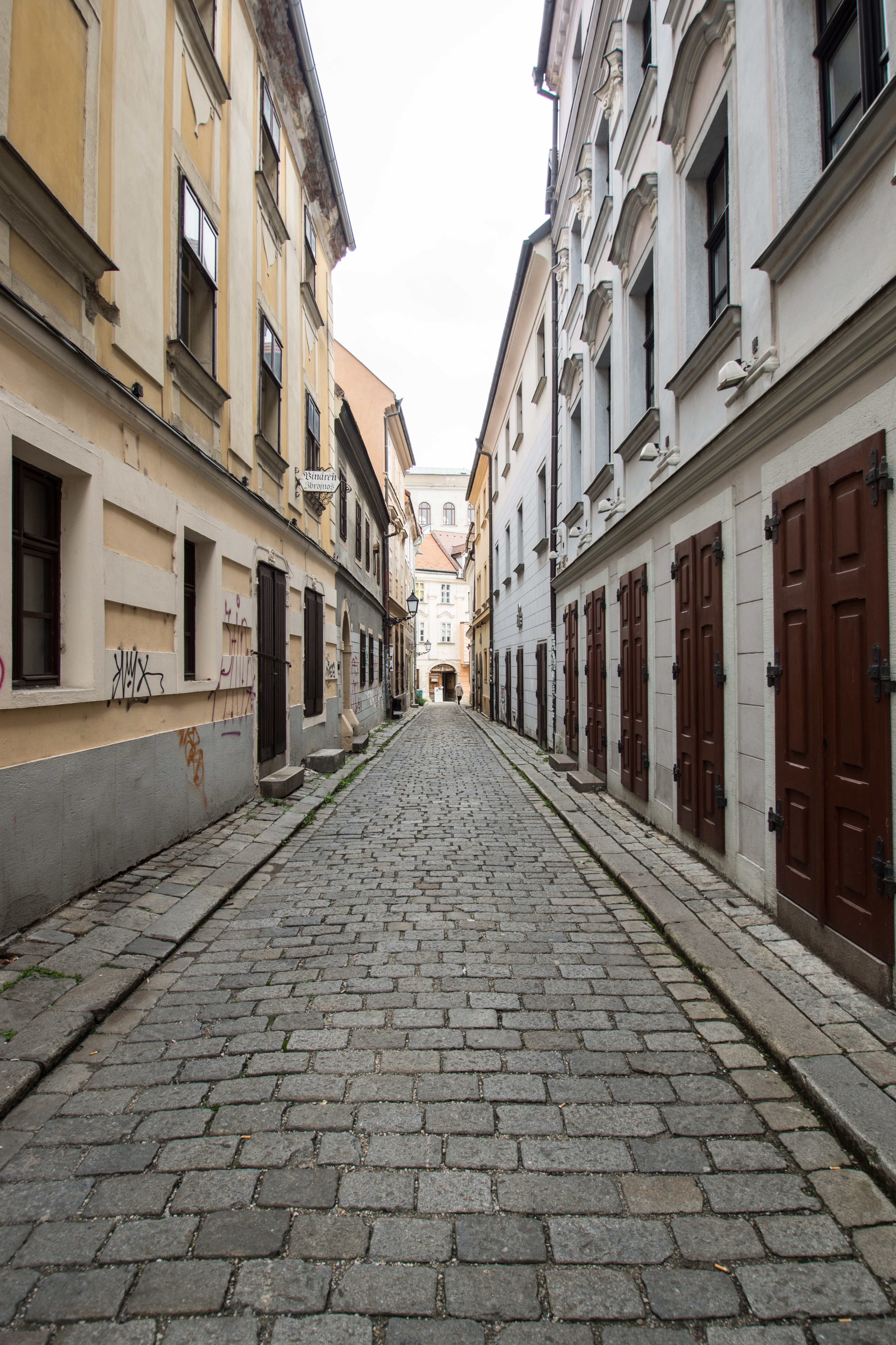 Casa en la calle ZámočníckaSlovenčina: DOM MEŠTIANSKY Zámočnícka